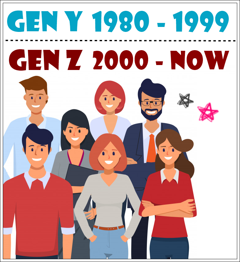 Die Illustration: Gen Z bezeichnet junge Menschen, die zwischen den Jahren 2000 und 2019 geboren sind.